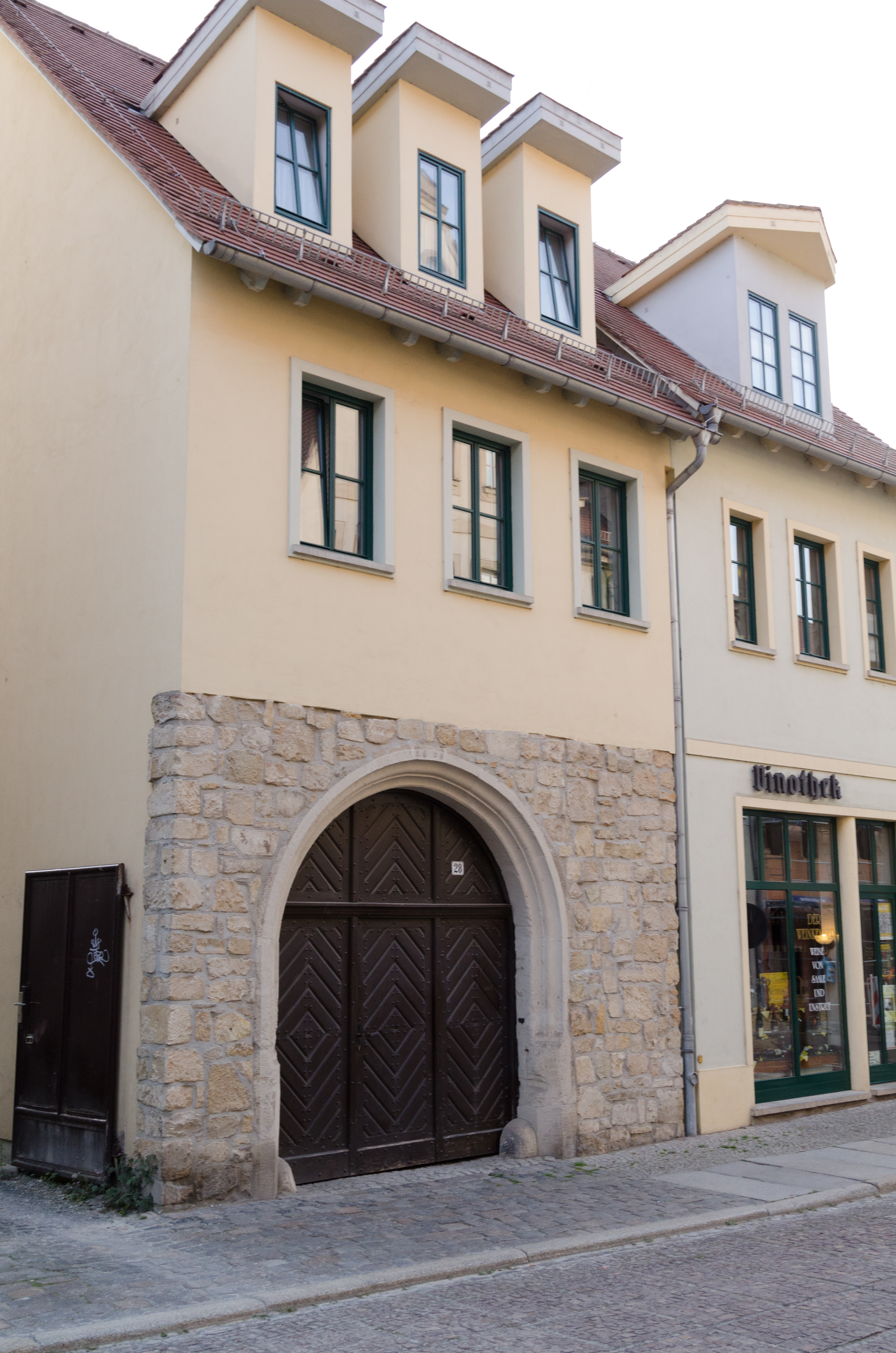 Naumburg, Marienstraße 28